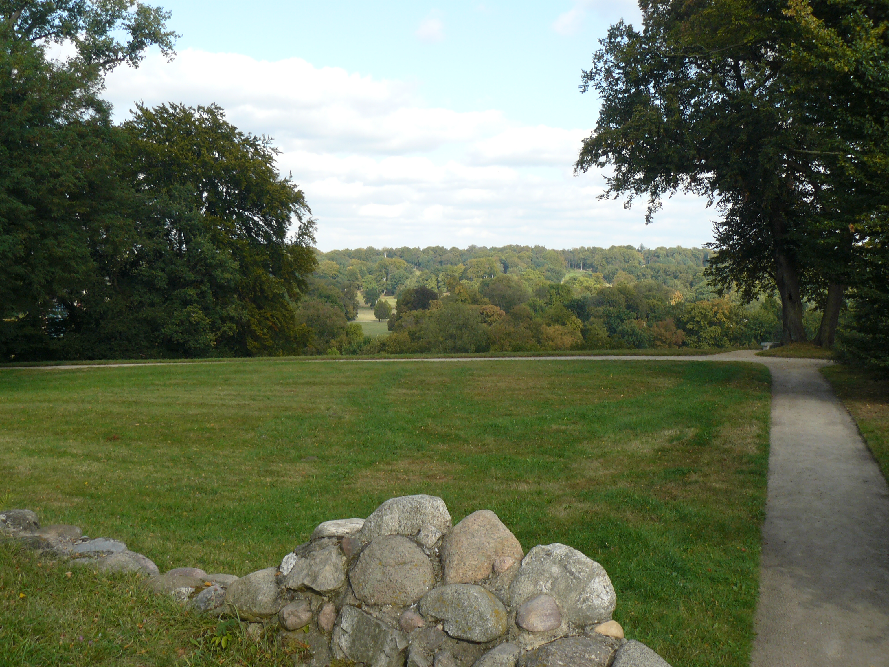 Berg, Bad Muskau: Blick von der Bergkirche über den Bergpark in Richtung Neiße